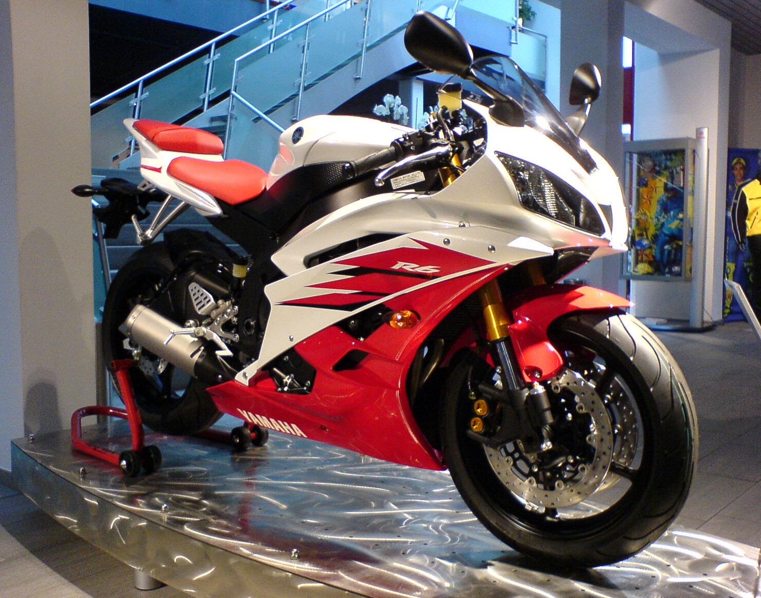 Yamaha YZF - R6 Model 2006 Source: self-made Photographer: P. Stalder (English user page) / P. Stalder (deutsche Benutzerseite) Location: Switzerland